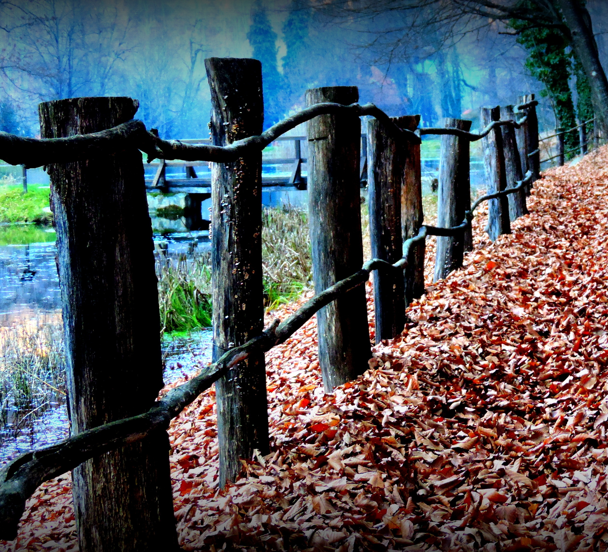 Šetnja uz donje Jankovačko jezero